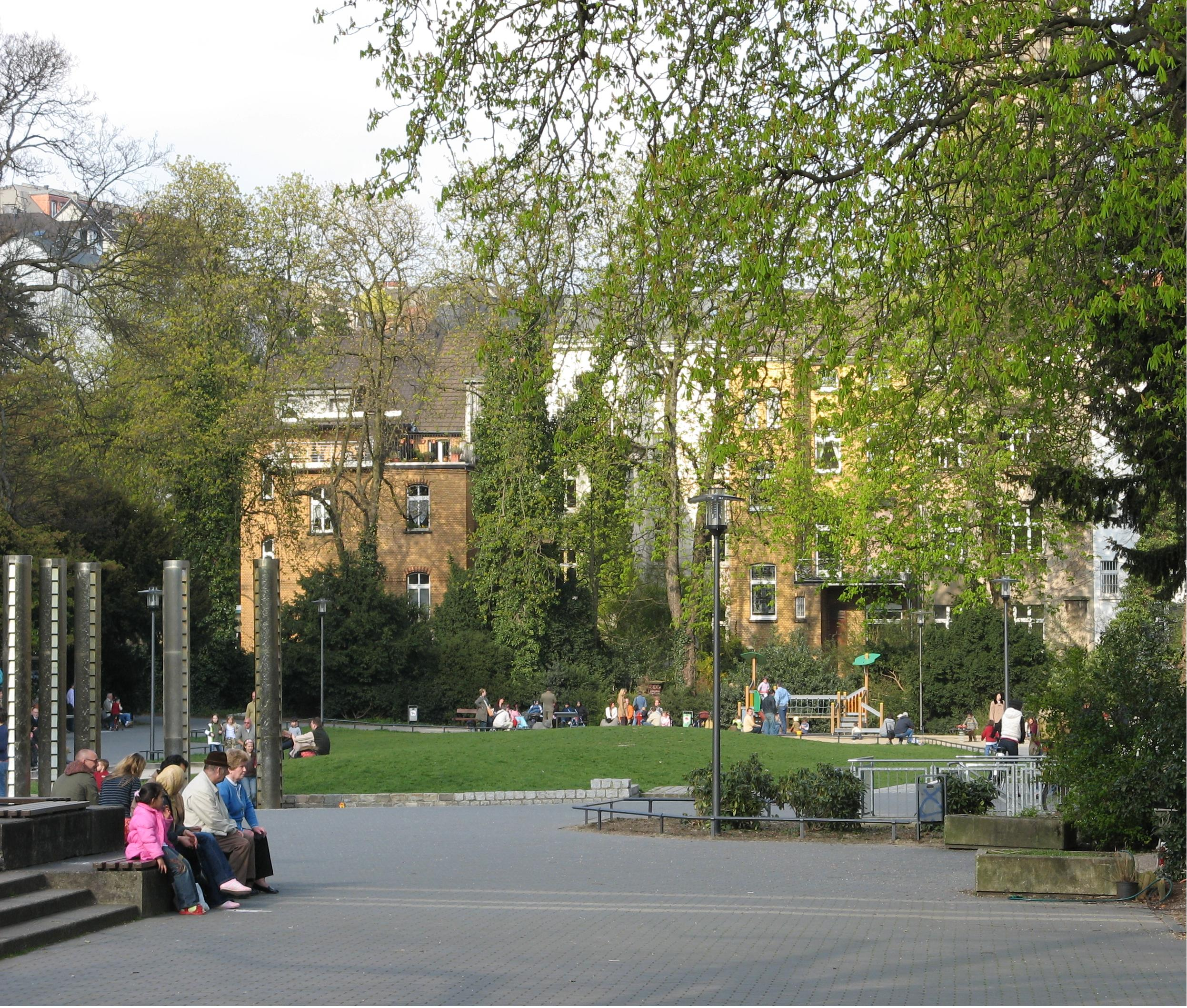 Der Deweerth'scher Garten ist eine über 200 Jahre alte, kleine innerstädtische Parkanlage im Wuppertaler Stadtteil Elberfeld